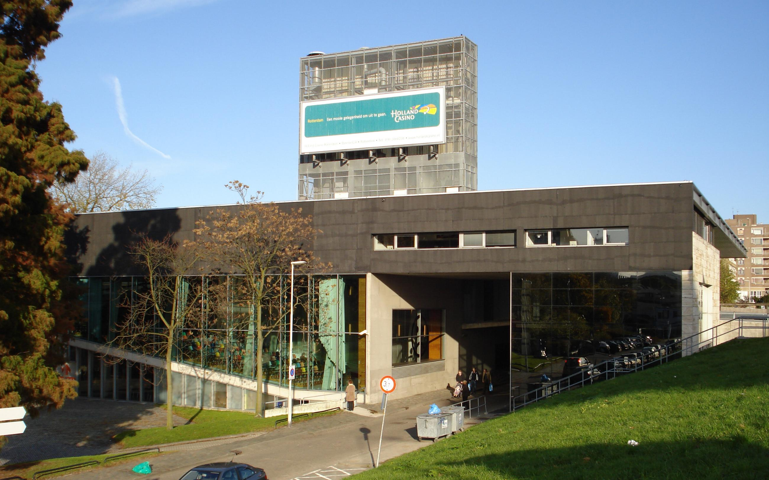 Rotterdam, westzijde Kunsthal.